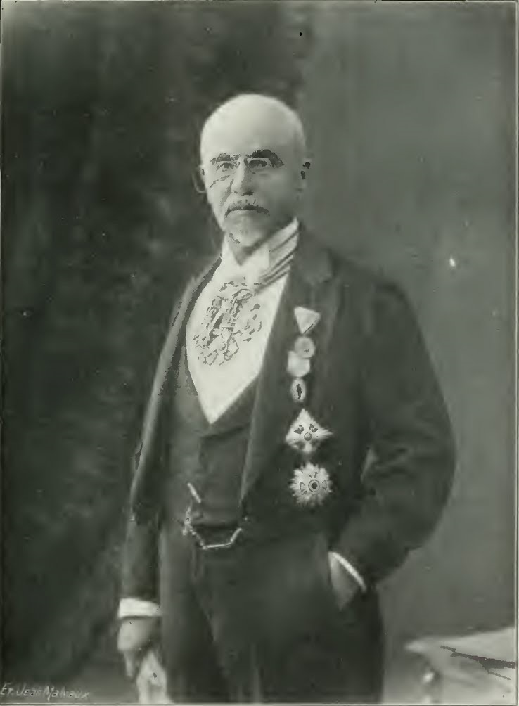 Антон Драндар.